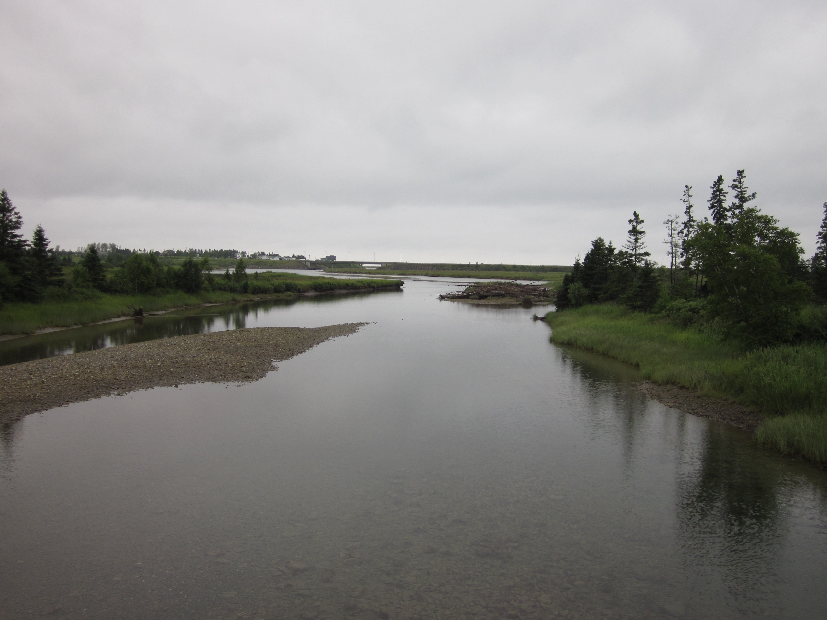 Barachois de Bonaventure vu des vieux ponts dans la réserve aquatique de l’Estuaire-de-la-Rivière-Bonaventure